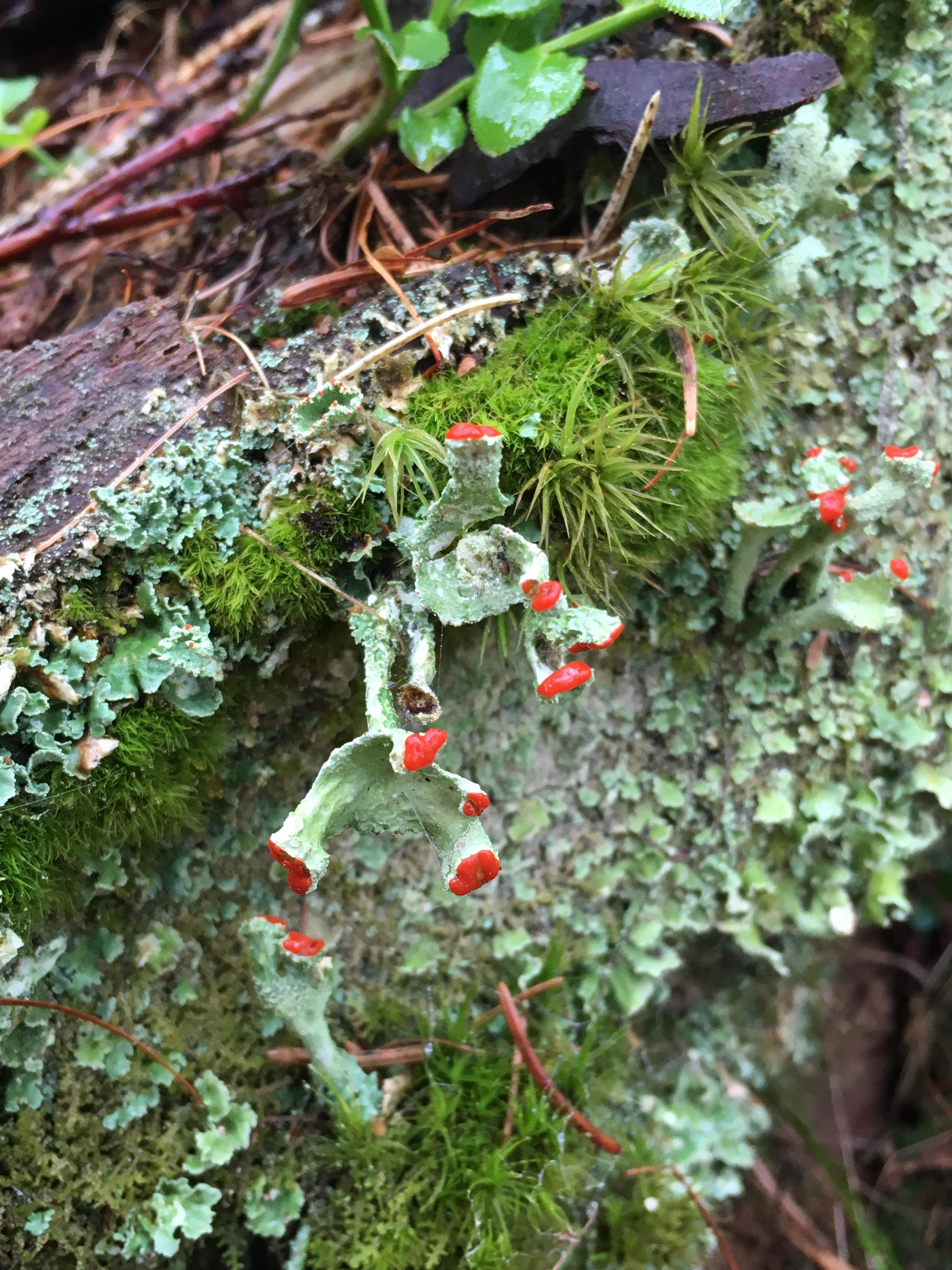 Nalezeno v okolí Šumavy - U Suchých Studánek Chráněný druh lišejníku, zapsáno v Červené knize